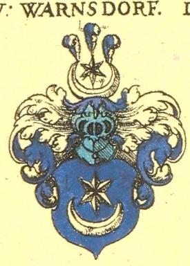 Wappen der Ritter von Warnsdorf nach Siebmacher